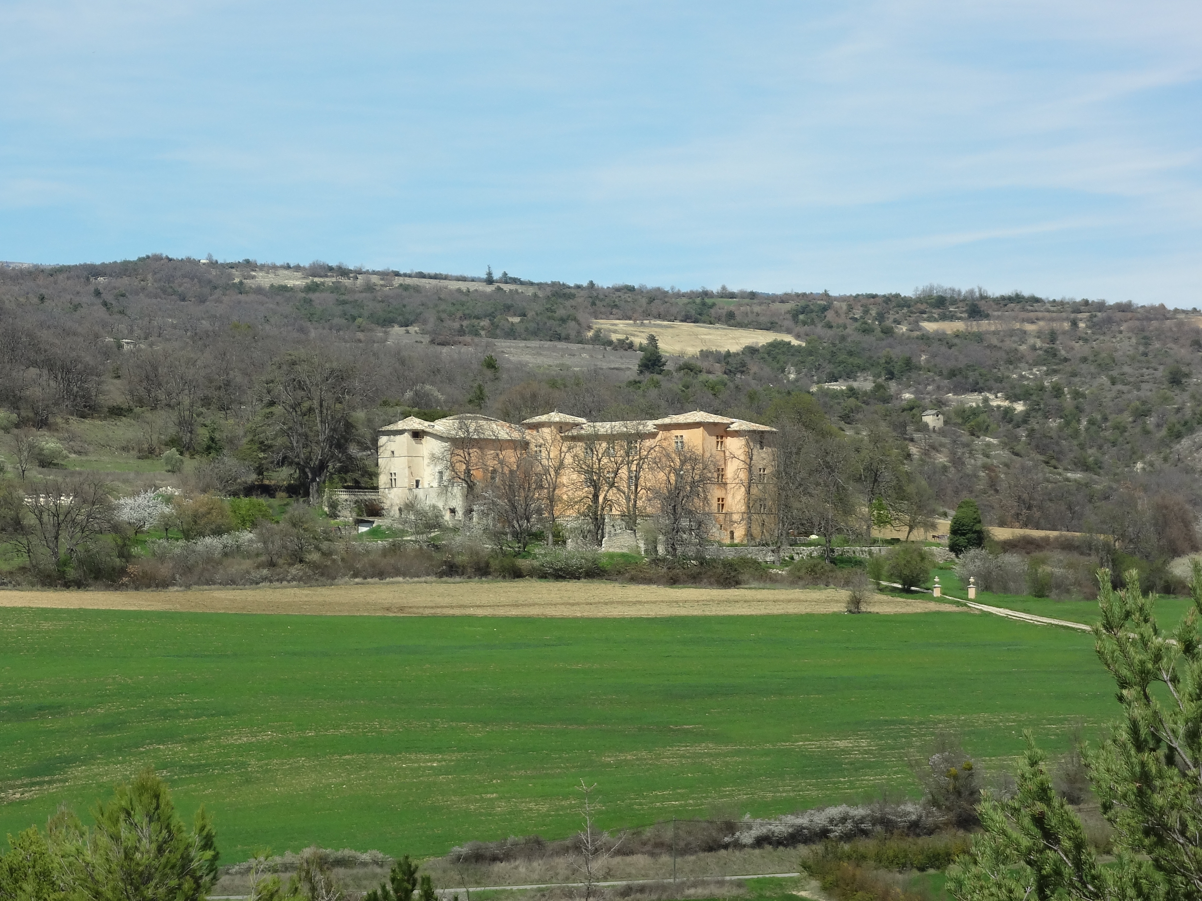 Château de Bel-Air (photo prise du lieu-dit Chantebelle)